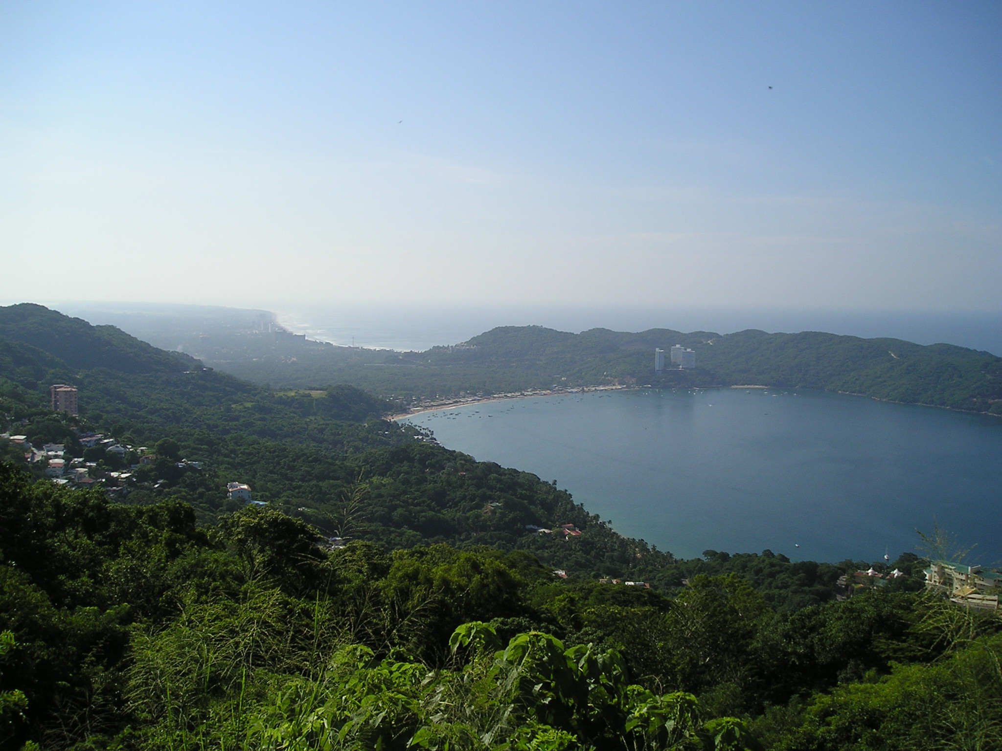 Bahía de Puerto Marqués desde la carretera Escénica en Acapulco, Guerrero, México.